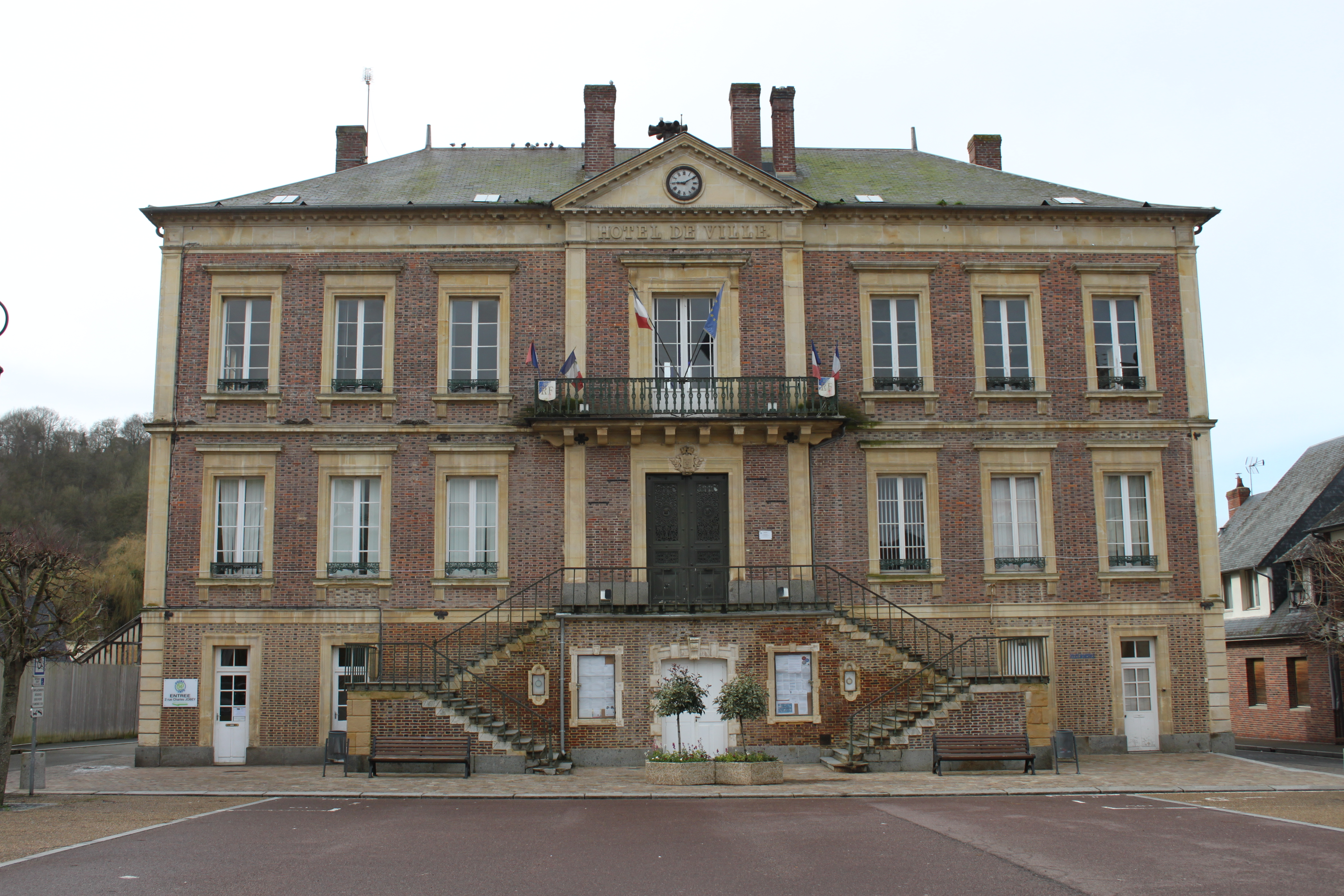 Mairie